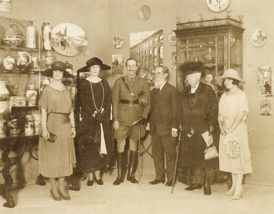 Alfonso XIII y su familia posando junto a la familia Zuloaga en una exposición celebrada en la casa familiar de la calle Bailén de Madrid en 1911.